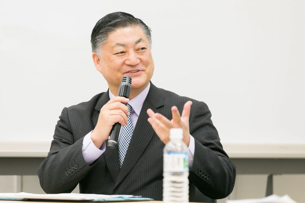 山口 博（2017年）